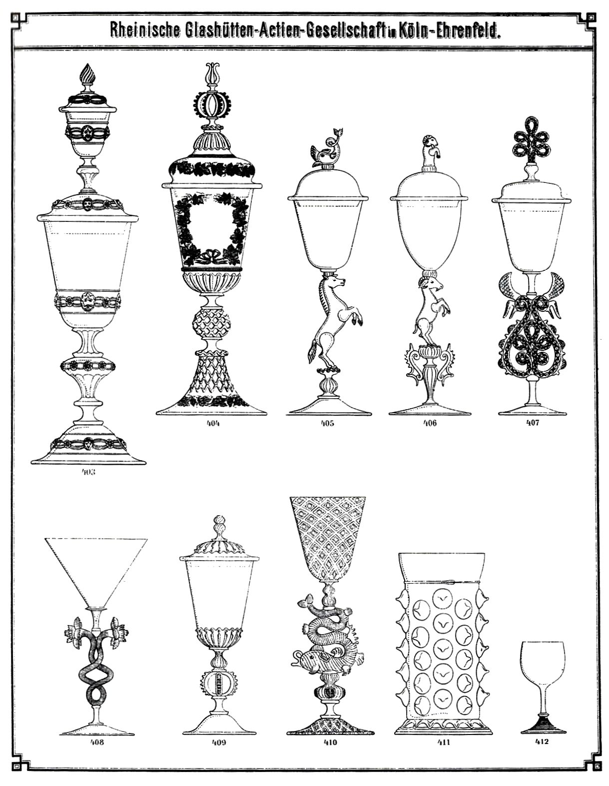 Musterblatt aus dem Preiscourant der Firma (1888)